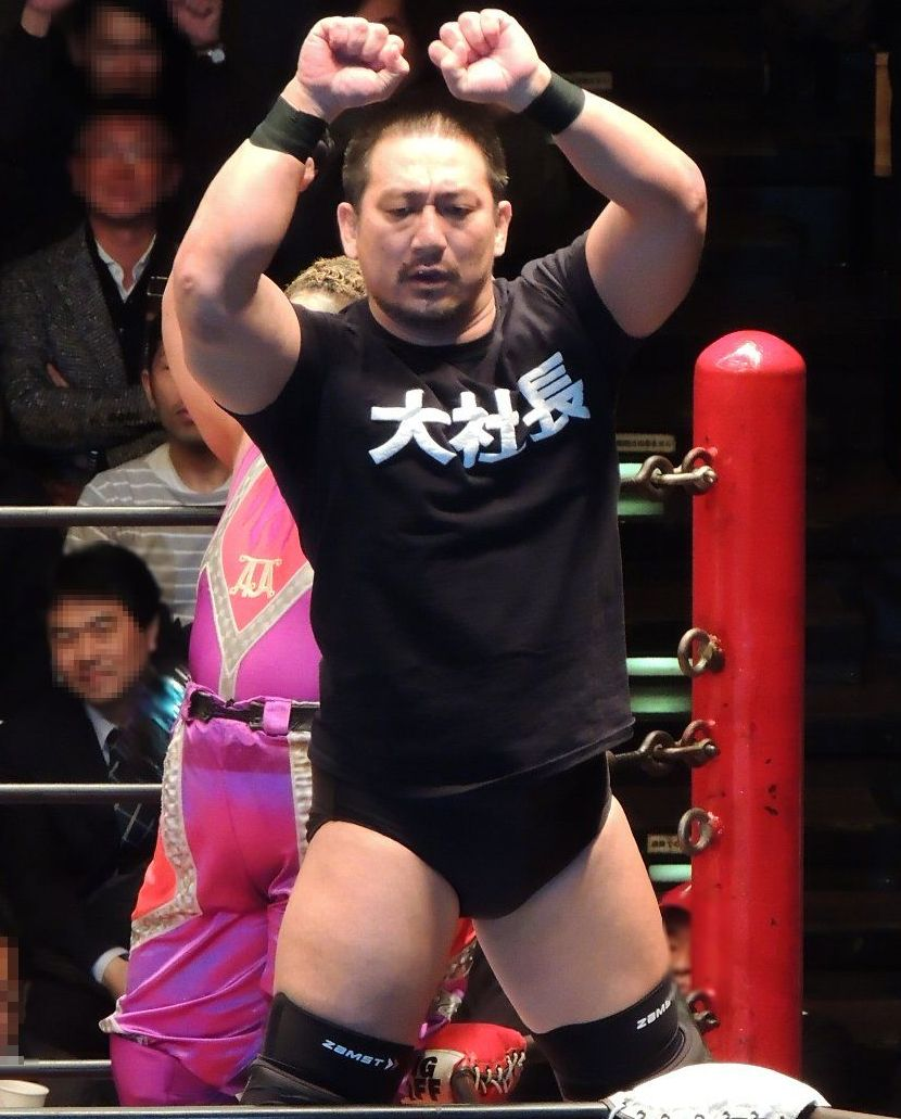 愚連隊にて